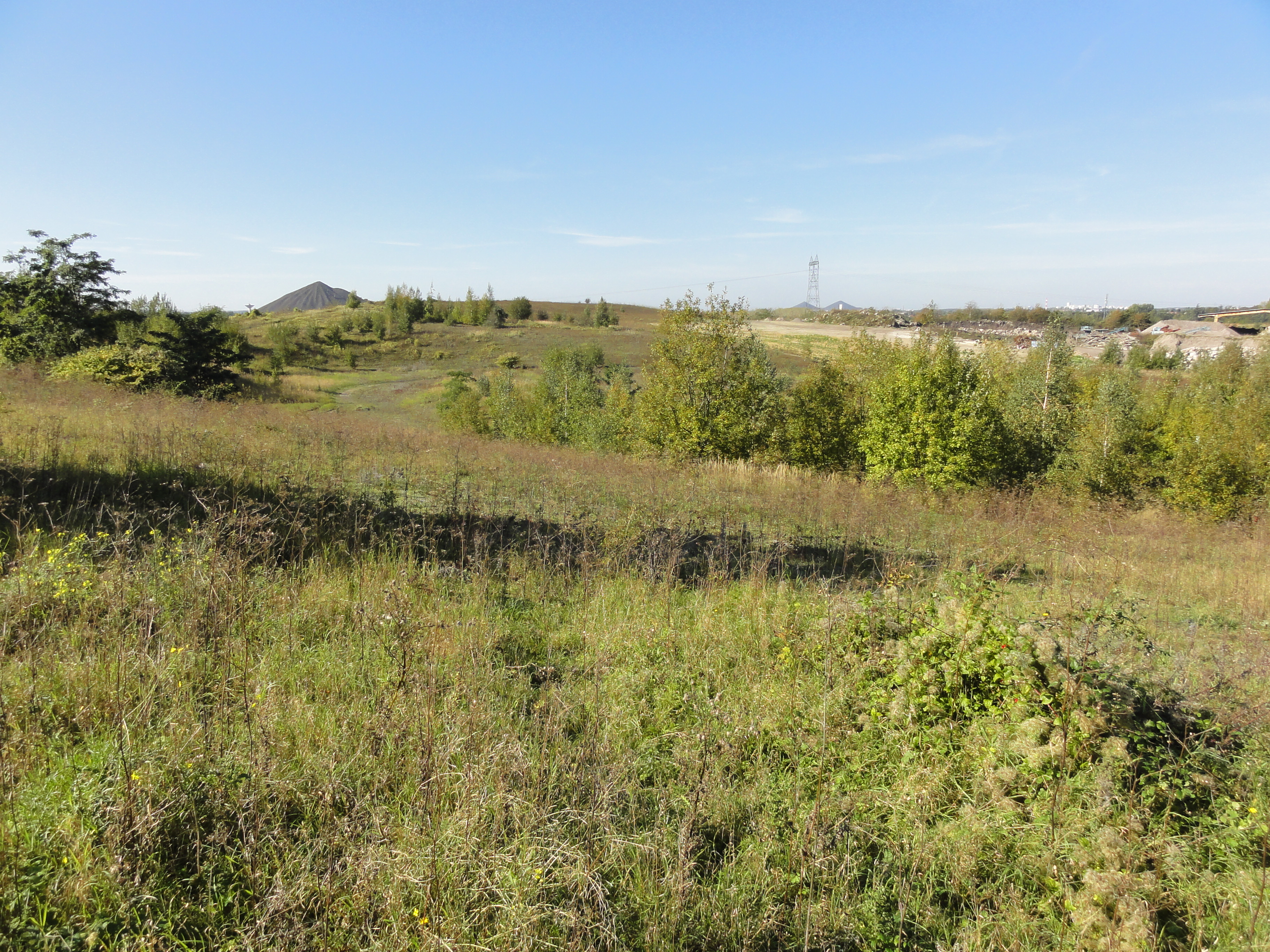 Terril n° 104 dit 10 Sud de Courrières sud, fosse n° 10 - 20 de la Compagnie des mines de Courrières dans le bassin minier du Nord-Pas-de-Calais, Billy-Montigny, Pas-de-Calais, Nord-Pas-de-Calais, France.